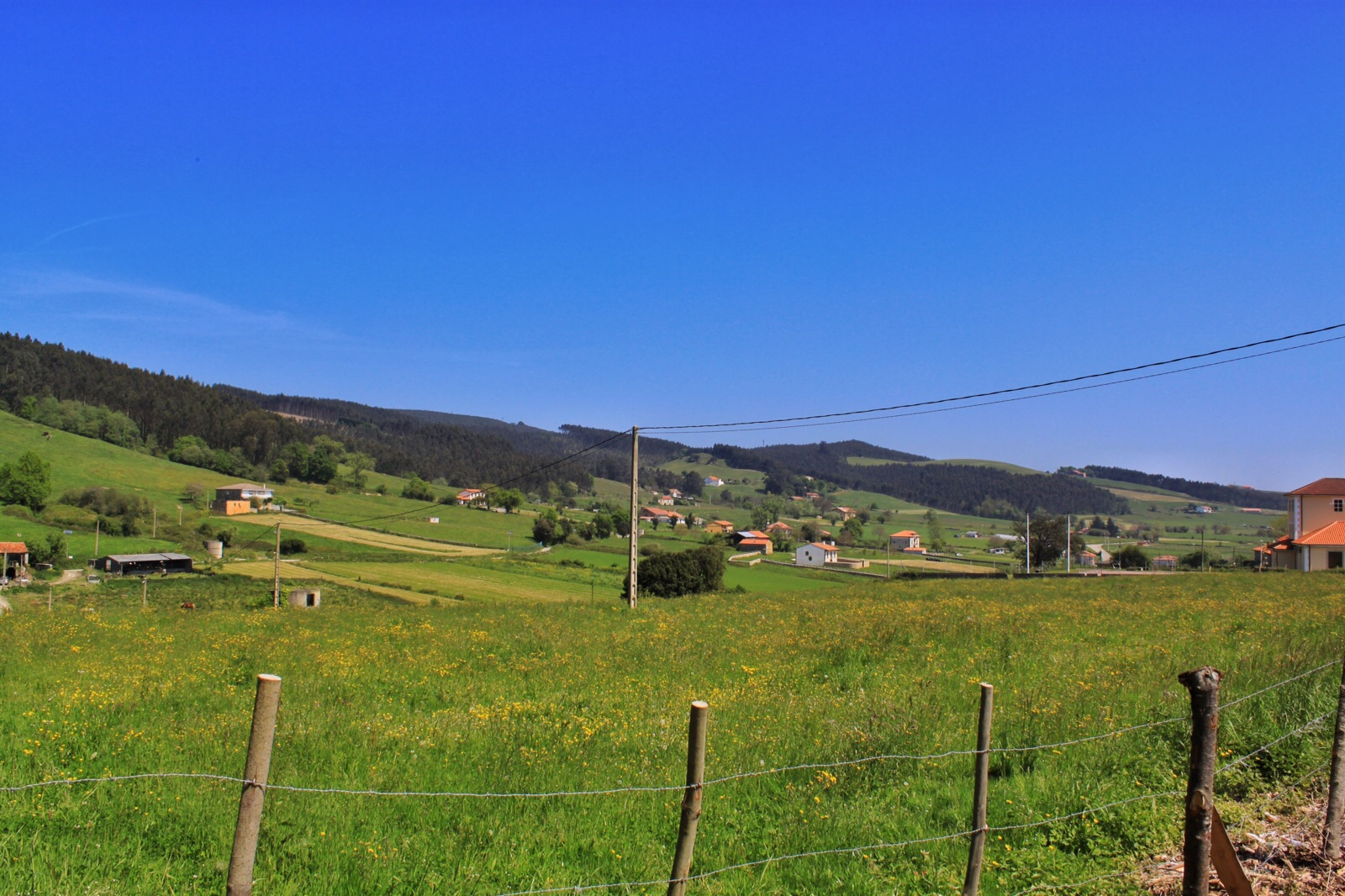 Vista general de la localidad de Güemes (Cantabria)